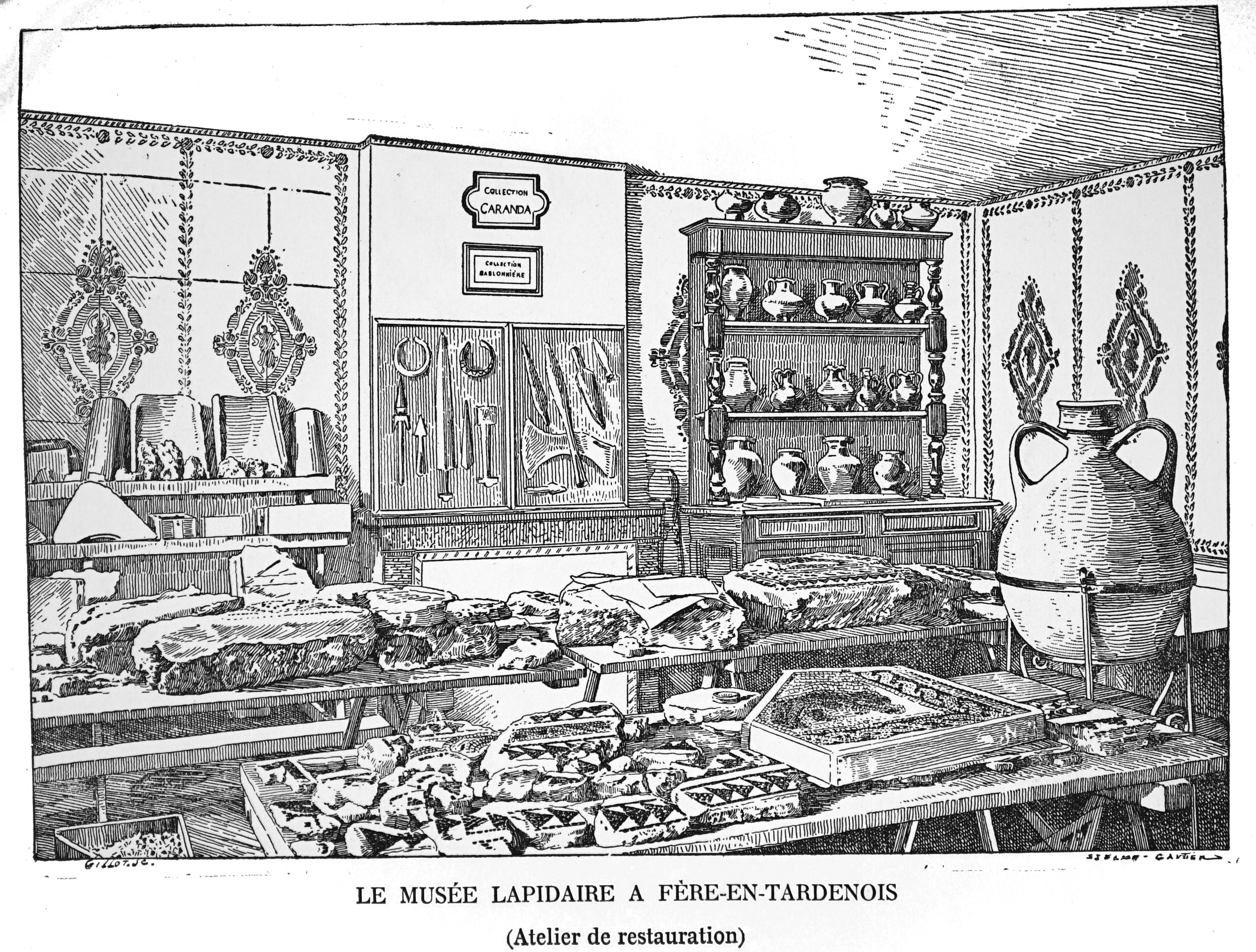 catalogue du musée de la rue de la Victoire.